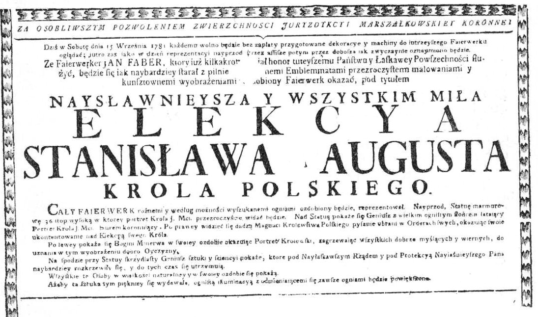 Ilustracja Encyklopedii staropolskiej T.1 021 - Afisz o fajerwerku z dnia 15 września 1781 r.